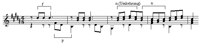 GNU-FDL, selbst erstellt